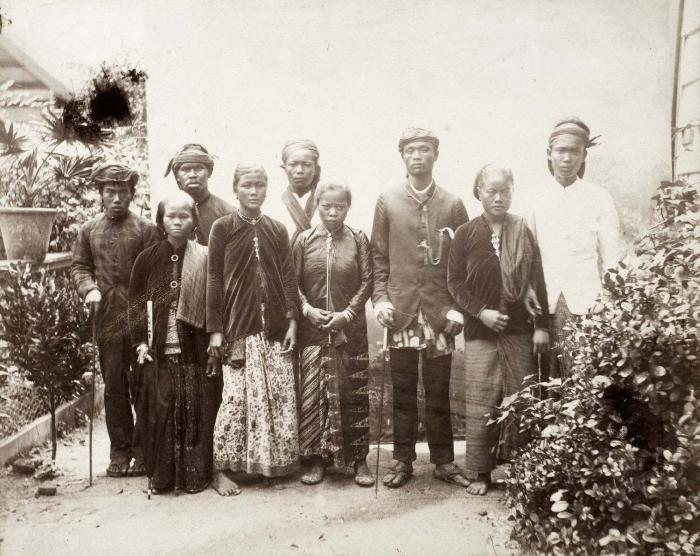 Foto. Portret van een groep Javaanse immigranten die sinds 1890 in Suriname verblijven, werkzaam op de plantage Mariënburg